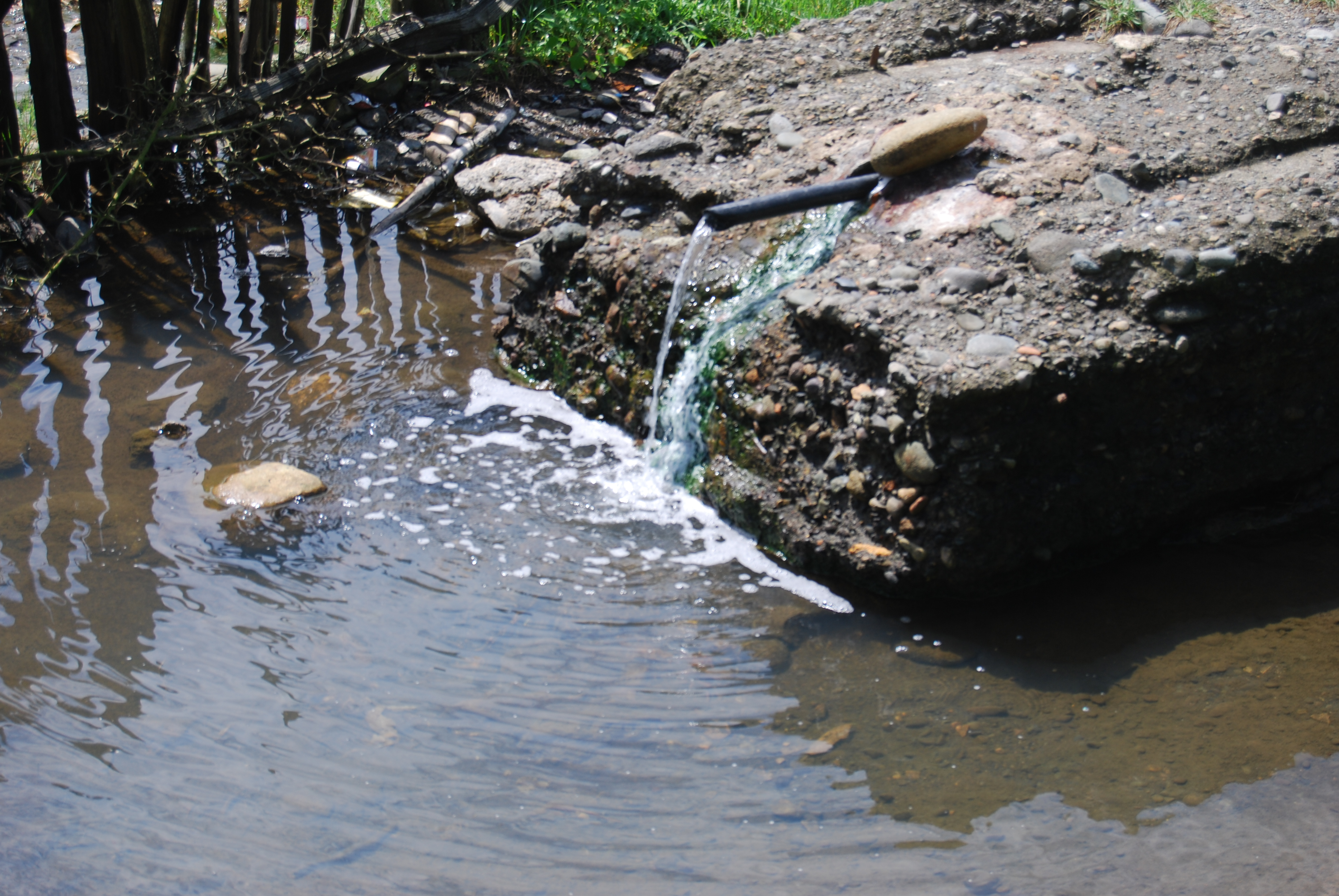 მჟავე წყალი ძიმითში